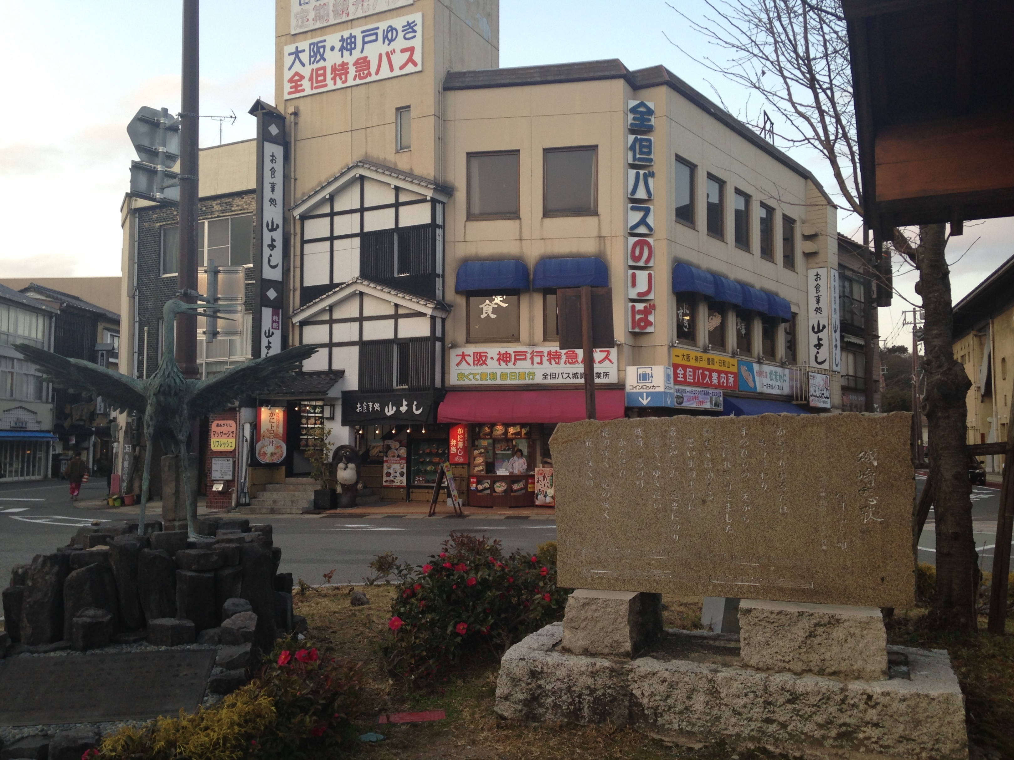 城崎温泉駅の駅前風景